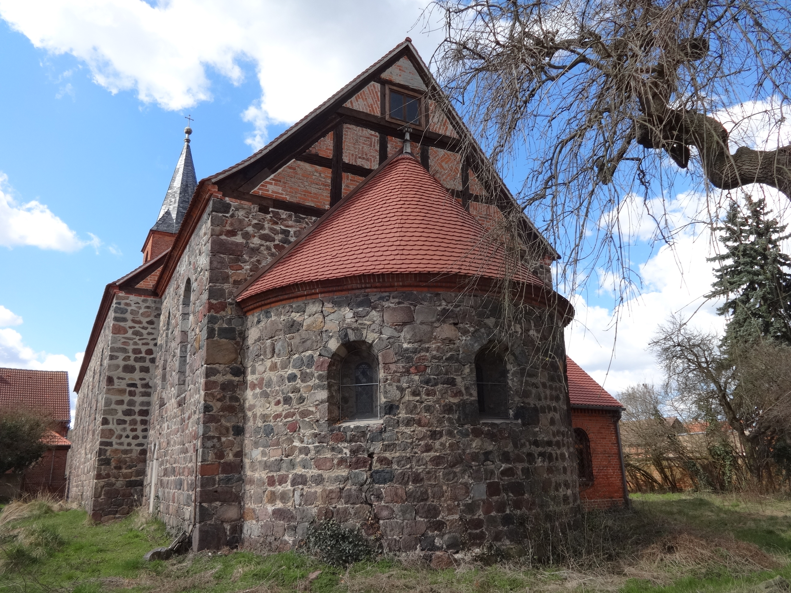 Die Dorfkirche Buckau entstand um 1200 als romanischer Feldsteinbau mit Chor und Apsis. Der neoromanische Backsteinturm wurde um 1860 angebaut. Im Innern befinden sich ein gotischer Schnitzaltar aus der Zeit um 1420 sowie eine Holzfigur der Mutter Gottes, die um 1390 entstand. Als Stufe zum Altar dient ein Grabstein der Gertrudis, der rund 800 Jahre alt ist und damit als der älteste Grabstein der Mark Brandenburg gilt.